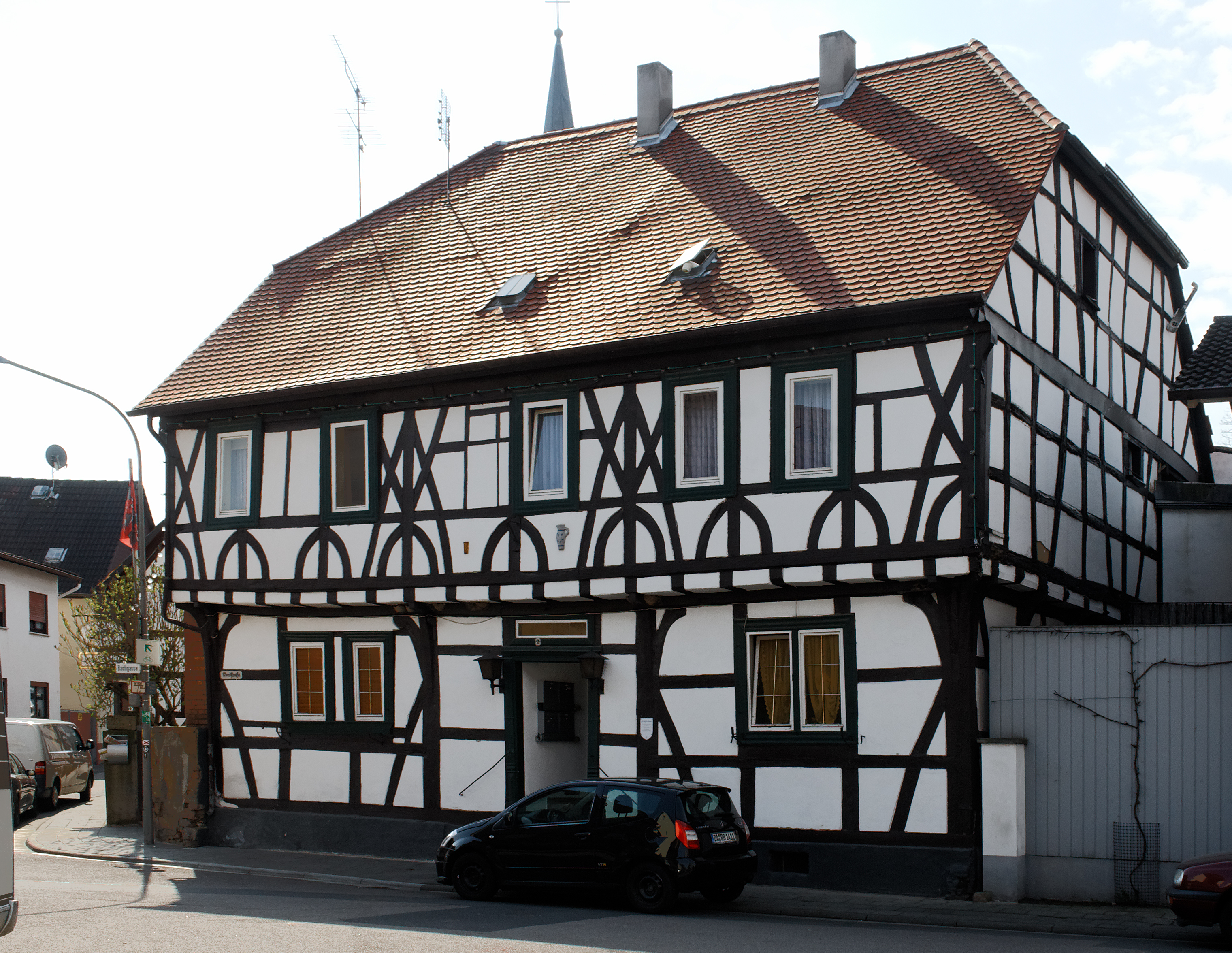 Ältestes bestehendes Wohnhaus in Schaafheim (Hessen). Das Fachwerk-Obergeschoss stammt aus der Zeit um 1500. Geburtshaus des Odenwälder Heimatdichters Georg Schäfer (1840-1914).